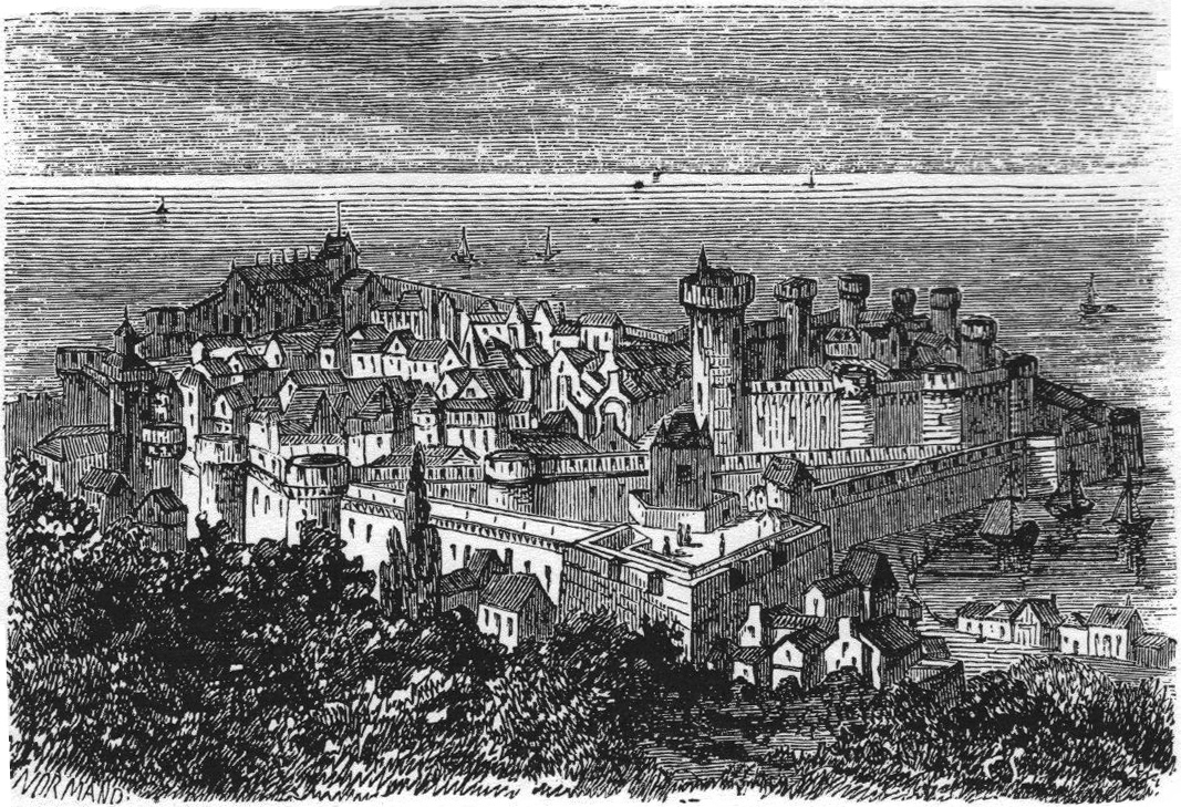 Gravure de Cherbourg avant l'arasement de ses remparts en 1689.